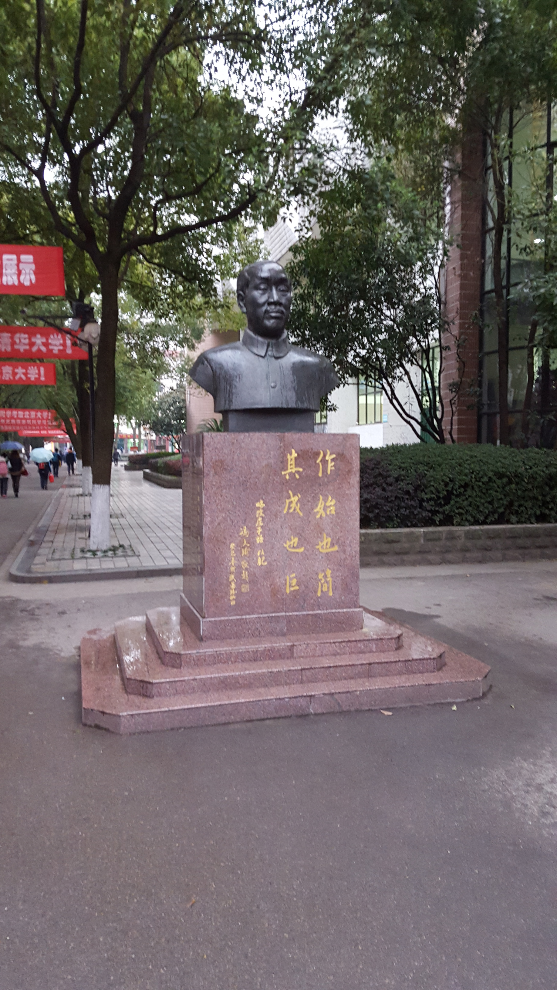 中文（中国大陆）: 宜昌一中董必武铜像